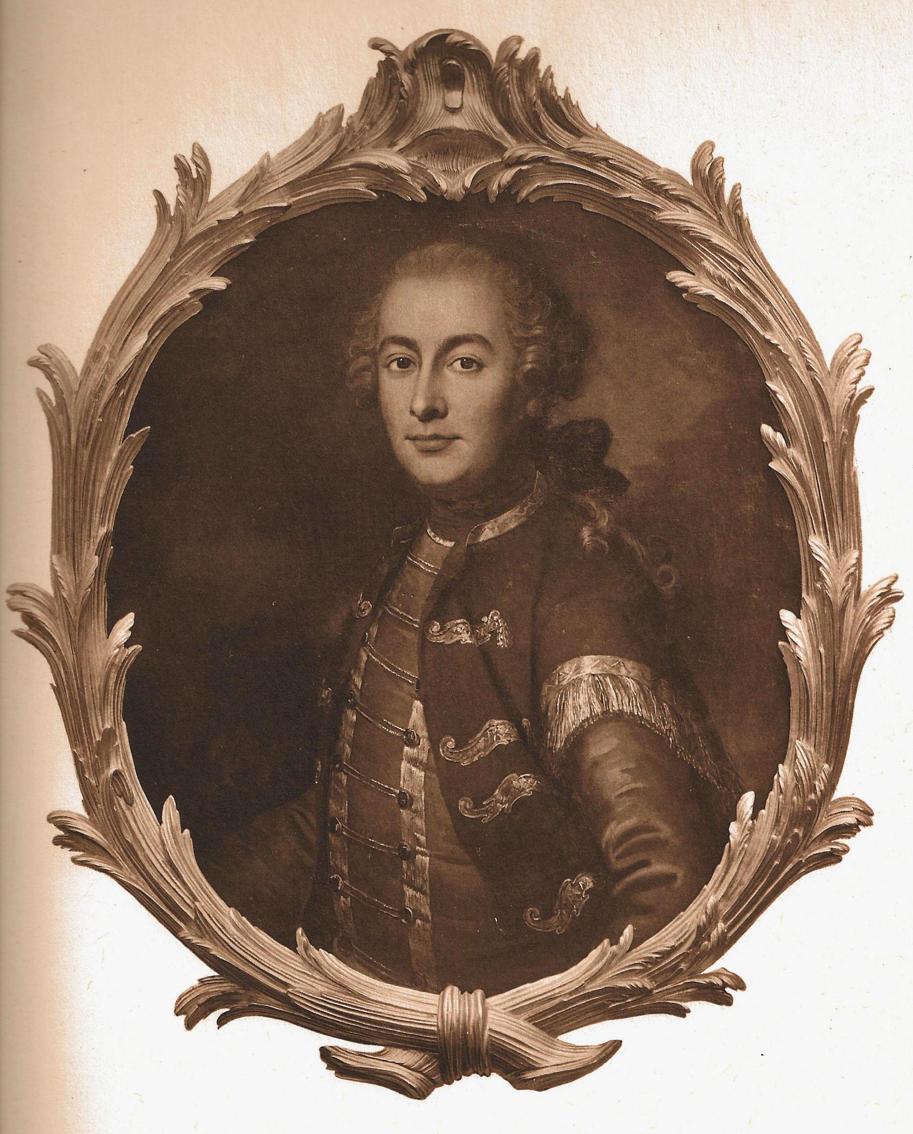 Bildnis Anton Ludwig Stürler (1725-1795), des Grossen Rats 1764, Landvogt zu Avenches und zu Biberstein, Herr zu Scheunen.